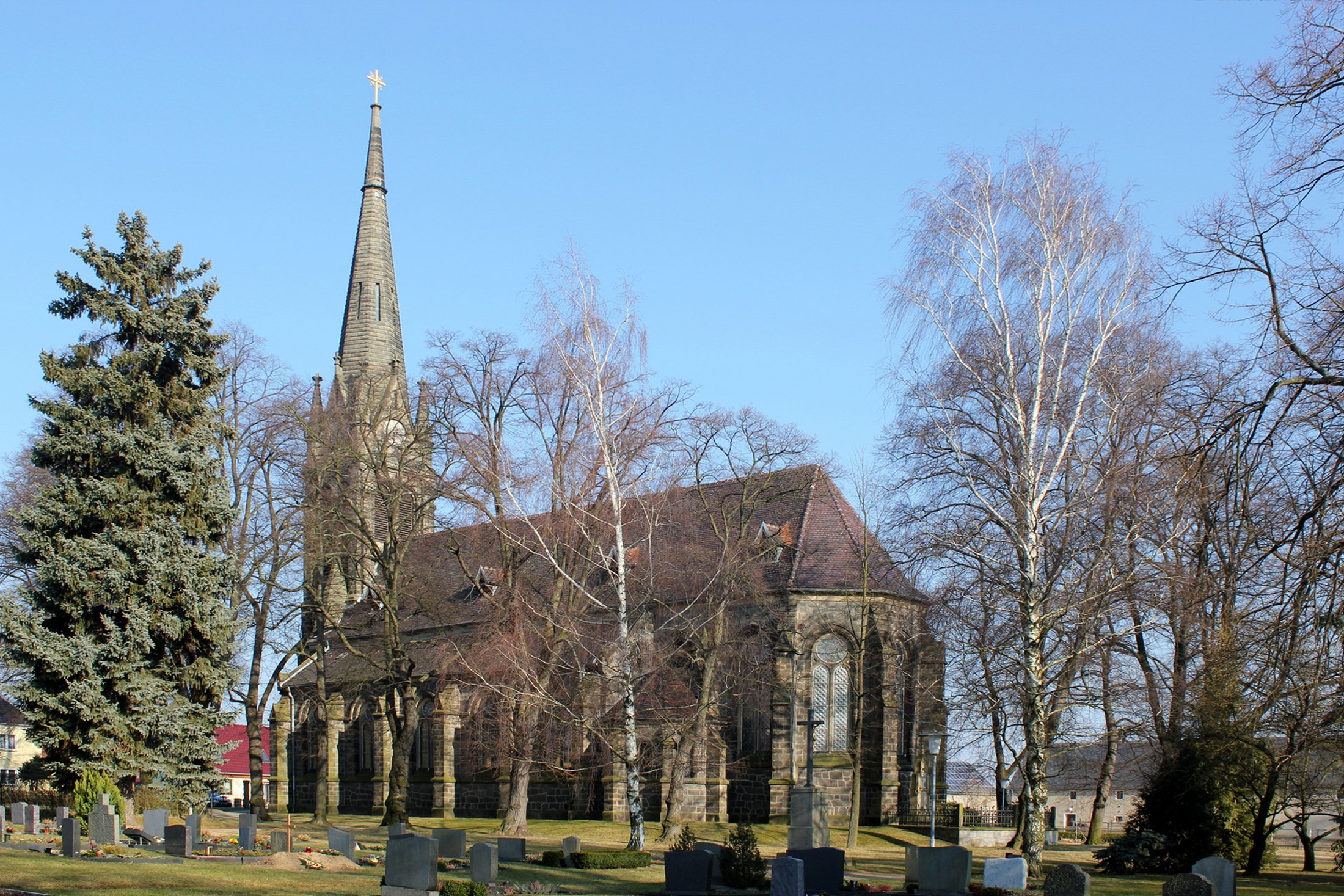 Hornjoserbsce: Na Baćońjanskim kěrchowje; napohlad cyrkwje.